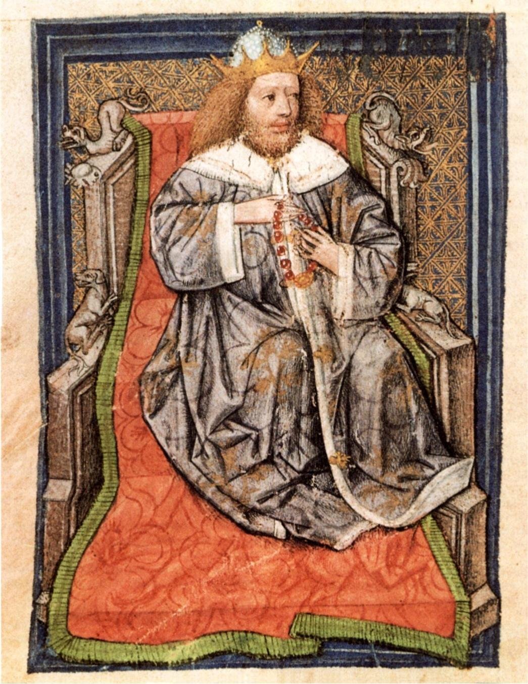 Erzherzog Albrecht VI. (Österreich). Miniatur des thronenden Herrschers mit Rosenkranz in einem für ihn angefertigten Gebetbuch (Pergamenthandschrift, 1455/63)